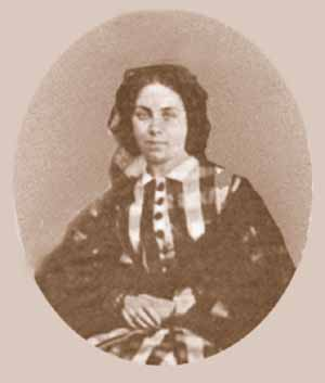 Евгения Ивановна Конради (1838 — 1898) - русская писательница, журналистка, публицист, переводчик, деятель российского женского движения